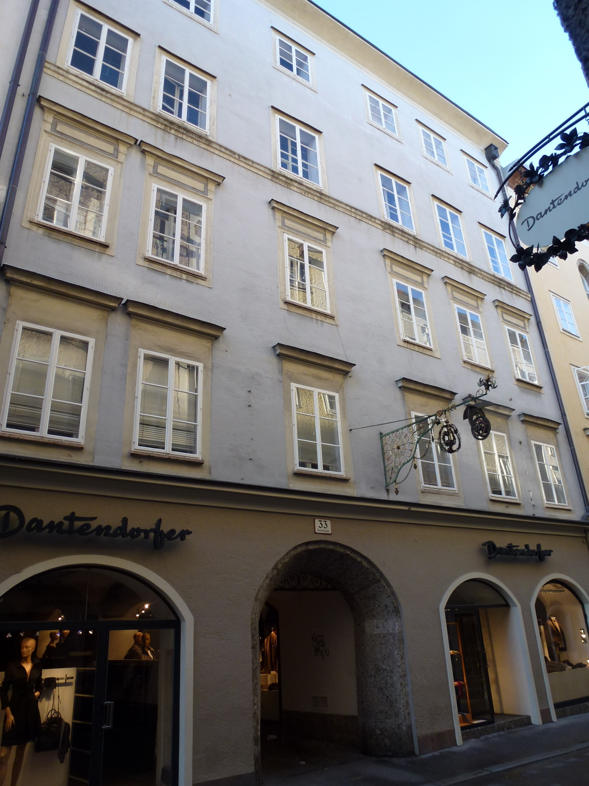 Bürgerhaus, Reitterhaus